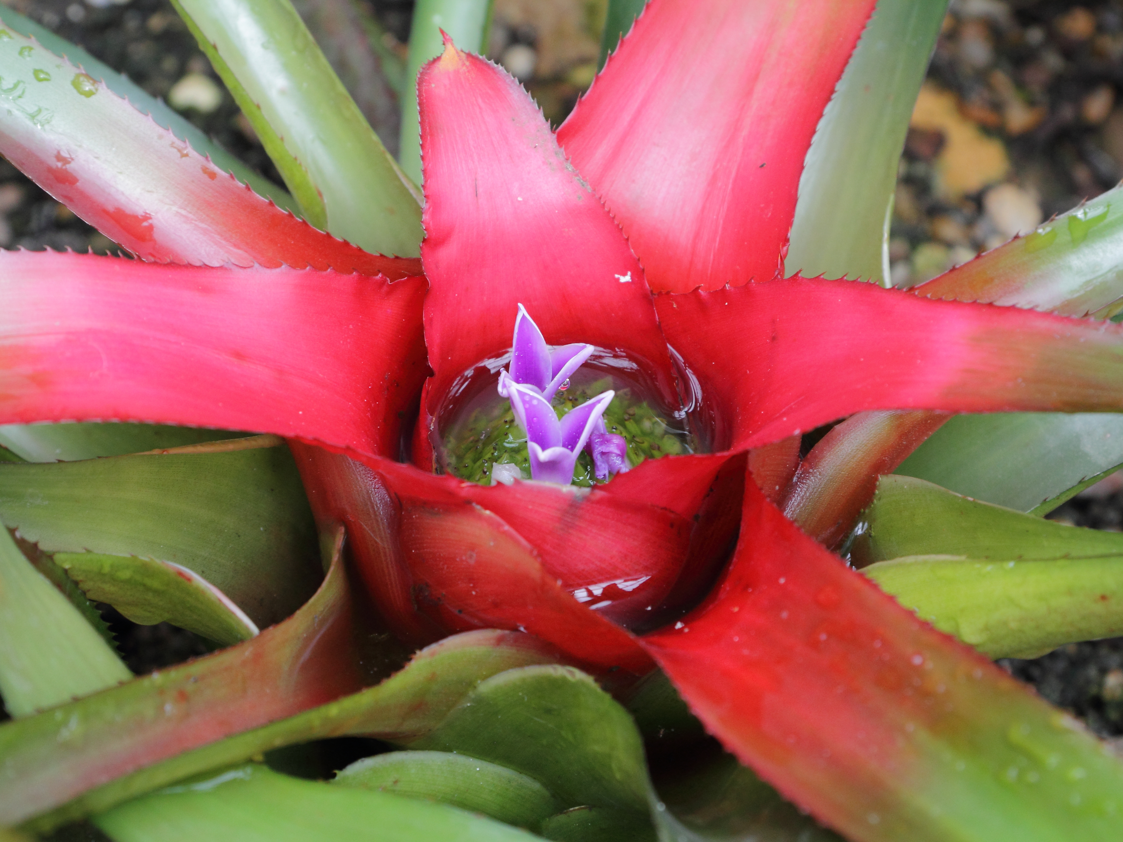 Neoregelia carolinae, identifierad med hjälp av befintlig skylt vid Kew Gardens, London.